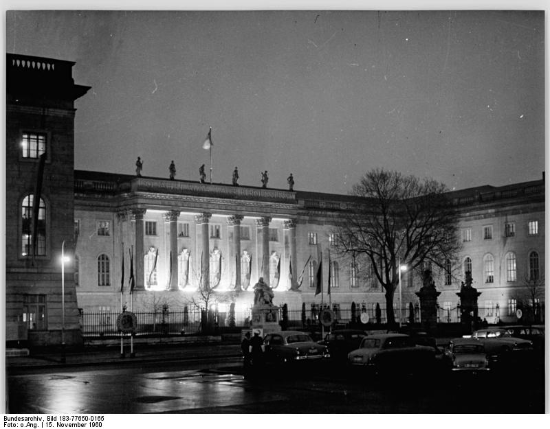 Berlin, Humboldt-Universität, Nacht ADN-ZB 15.11.1960 Nl-Schä 150-Jahrfeier der Berliner Humboldt-Universität Die festlich erleuchtete Humboldt-Universität bei Nacht.